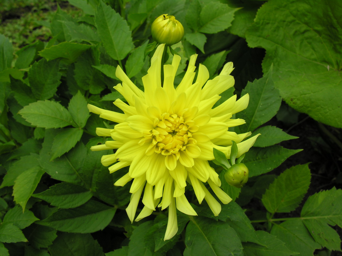 Darželinis jurginas (Dahlia cultorum) Šeima. Astriniai (Asteraceae) Foto: Algirdas, 2005 m. spalio 4 d.